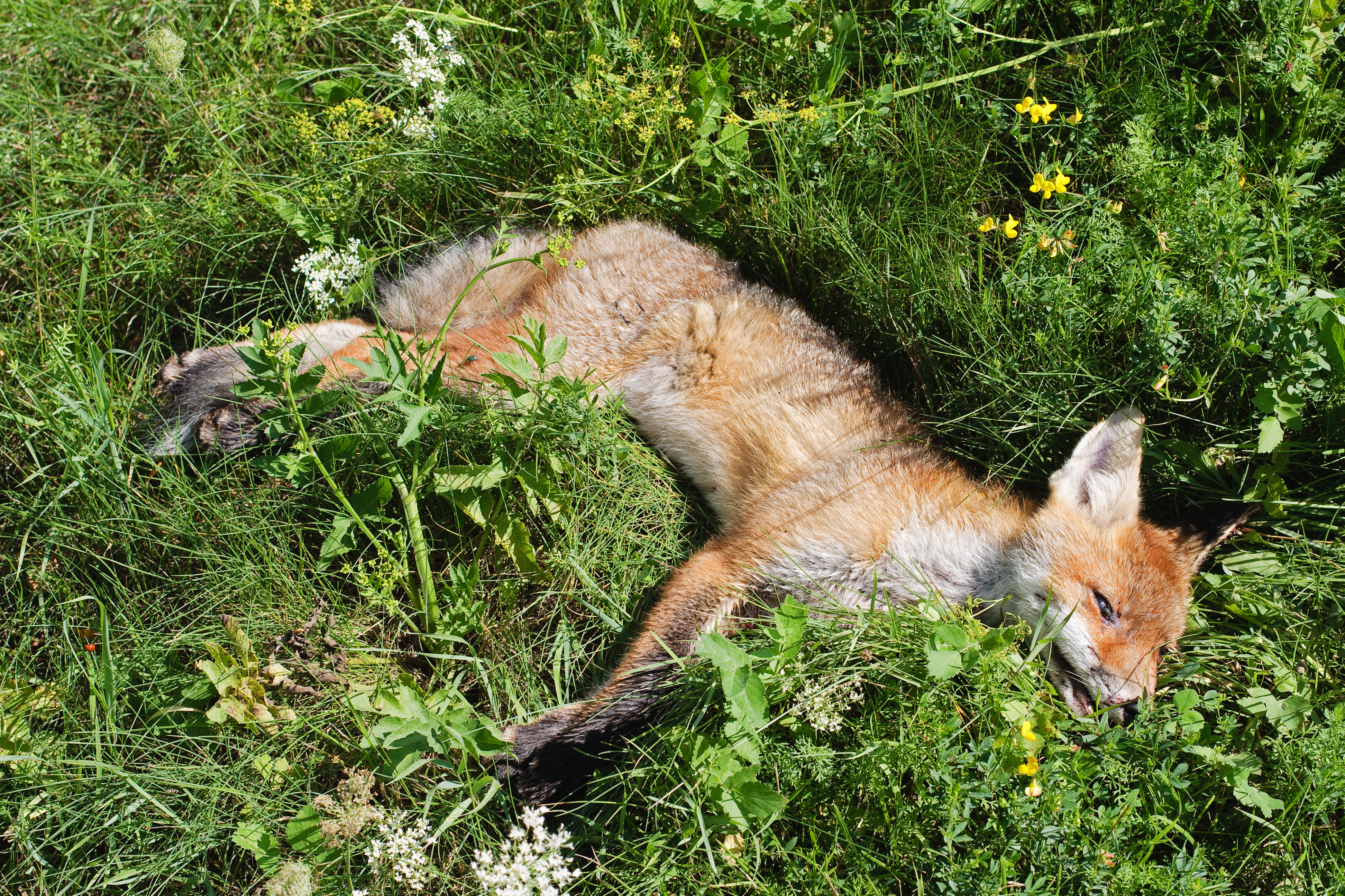 Ein toter Fuchs am Rand der Steyrtalstraße (Leonstein, Gemeinde Grünburg)